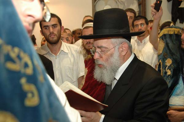 ישיבת מרכז הרב. הרב שפירא בשמחת בית השואבה בבית הרב קוק